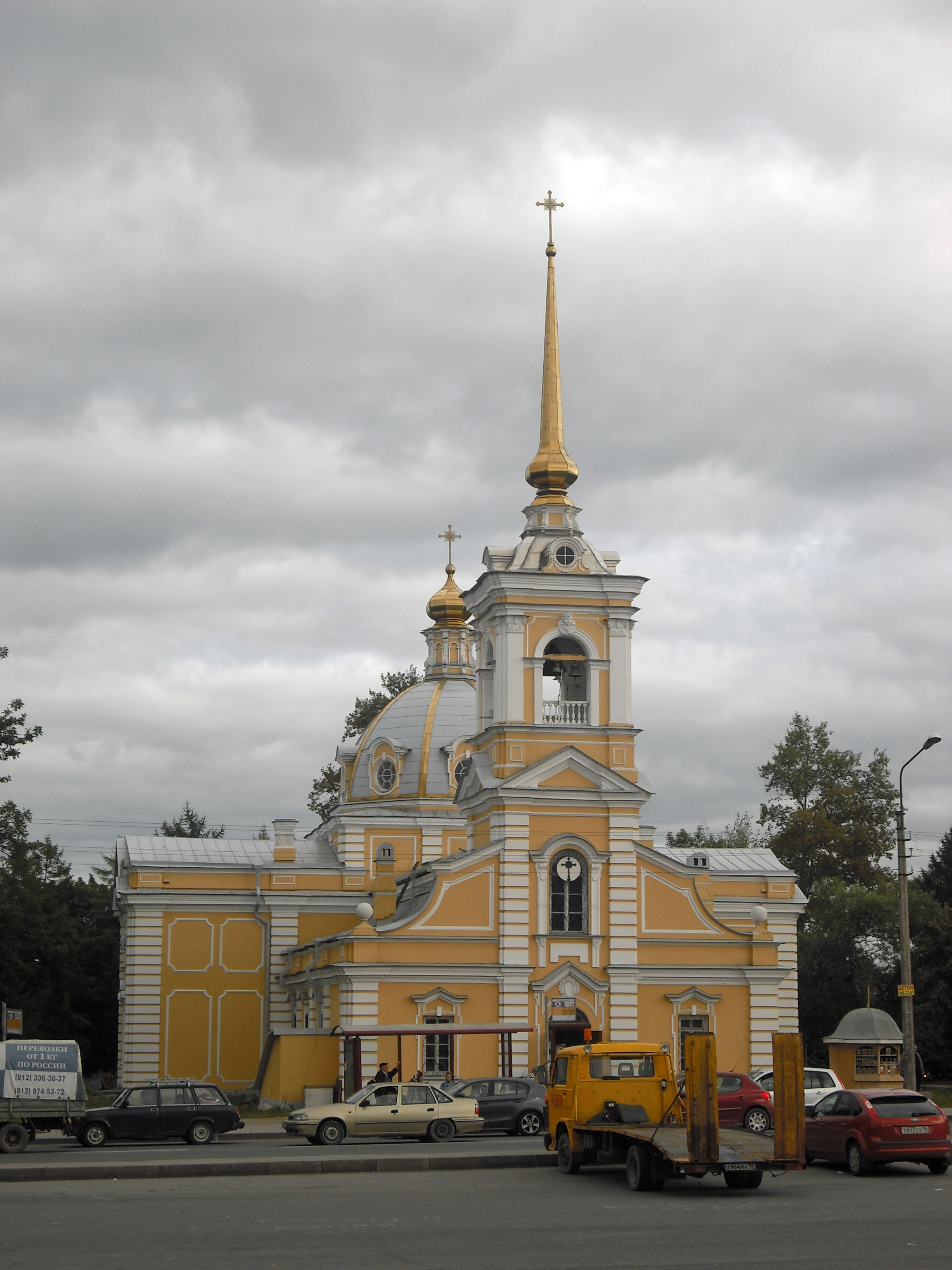 Троицкая церковь в Красном Селе (Санкт-Петербург)